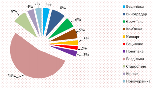 Диаграмма населения Раздельнянской ОТГ на момент создания